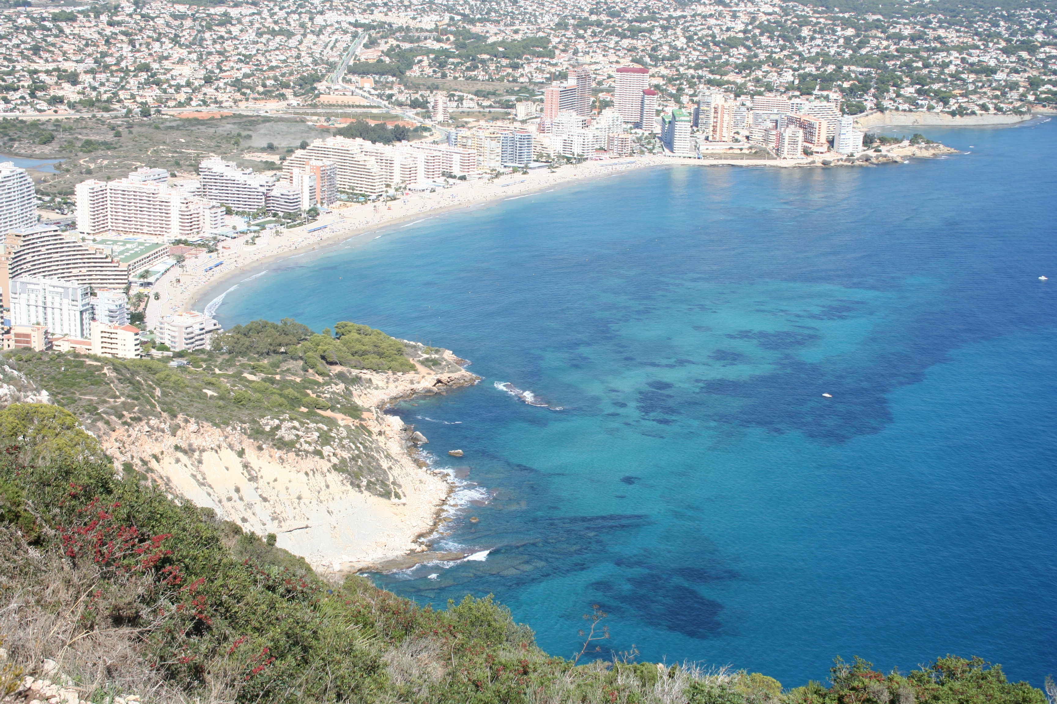 Playa de El Fosa desde el Peñón de Ifac